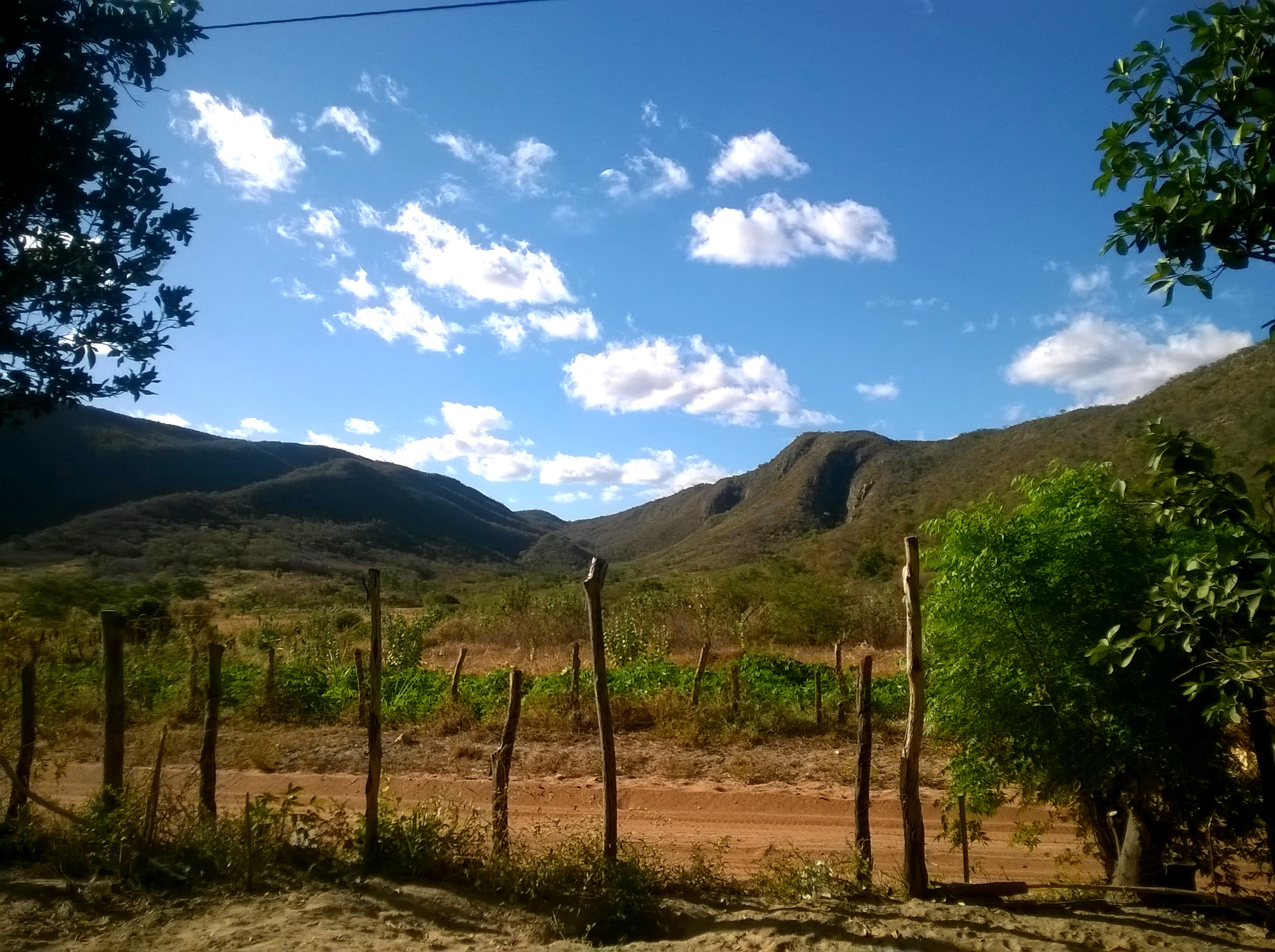 Vista das serras do Boqueirão, Paratinga, em julho de 2016.